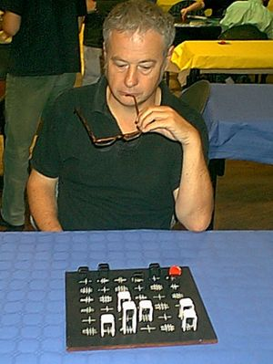 Photographie du jeu Mana Mutu, primé à Besançon en 2002, avec son auteur Claude Leroy Photo prise par françois Haffner, libre d'utilisation.